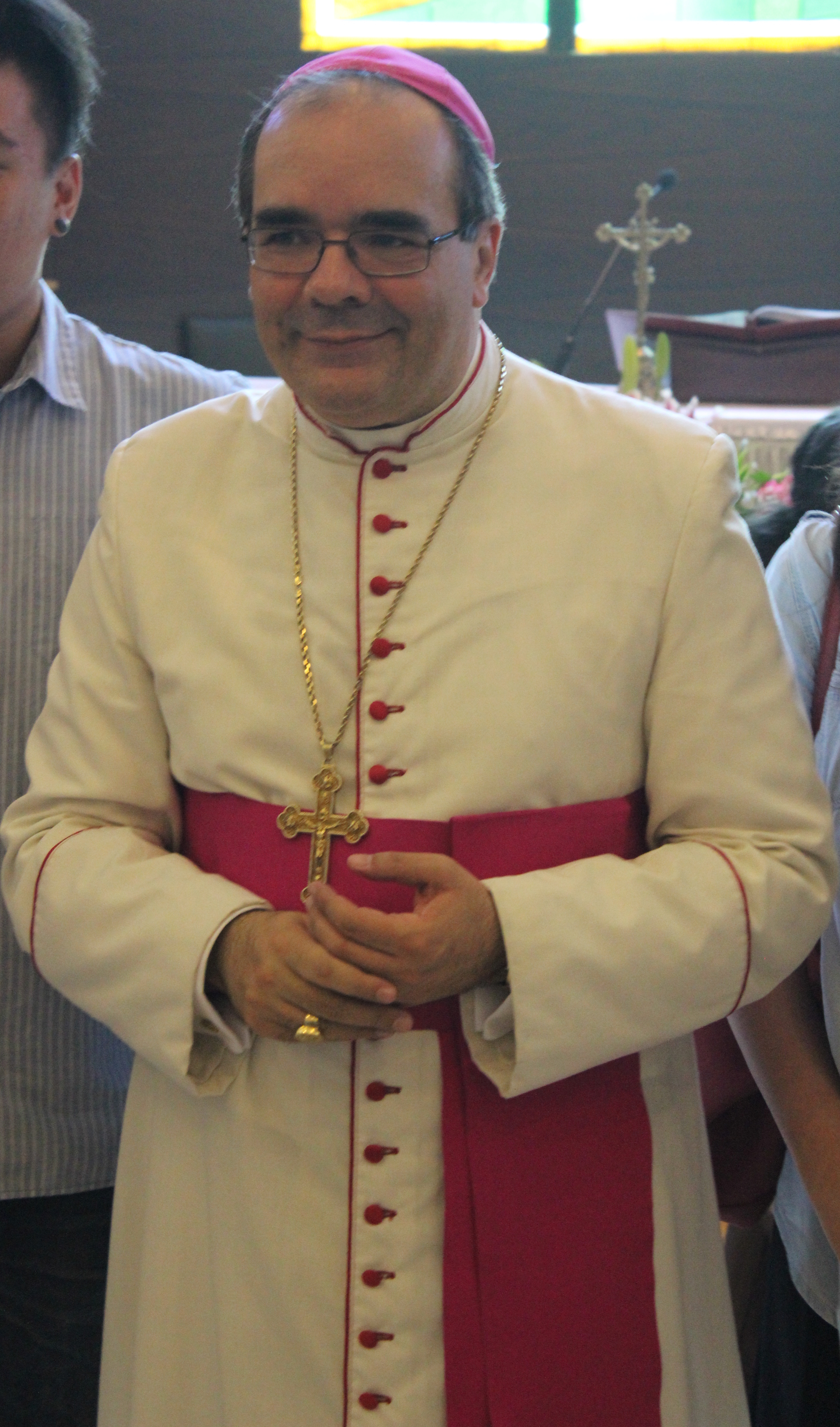 Mgr. Antonio Guido Filipazzi